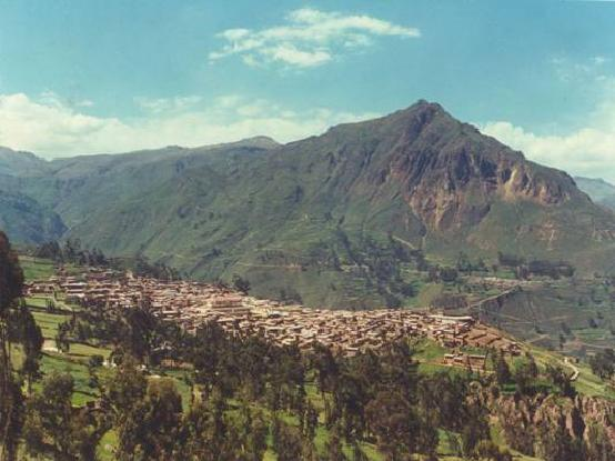 habitat de la ortiga blanca